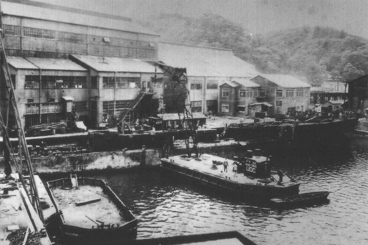 元日本海軍鵜来型海防艦『蔚美』、解体中、浦賀船渠